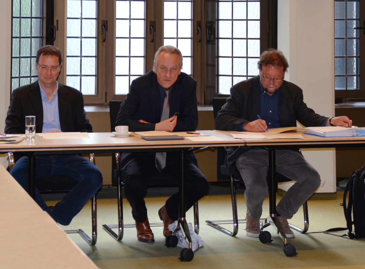 Vorstand der Archäologischen Kommission für Niedersachsen bei der Jahresversammlung 2014 in Hannover mit (v.l.n.r.) Schatzmeister Axel Friedrichs, Vorsitzender Rolf Bärenfänger und Zweiter Vorsitzender Michael Geschwinde